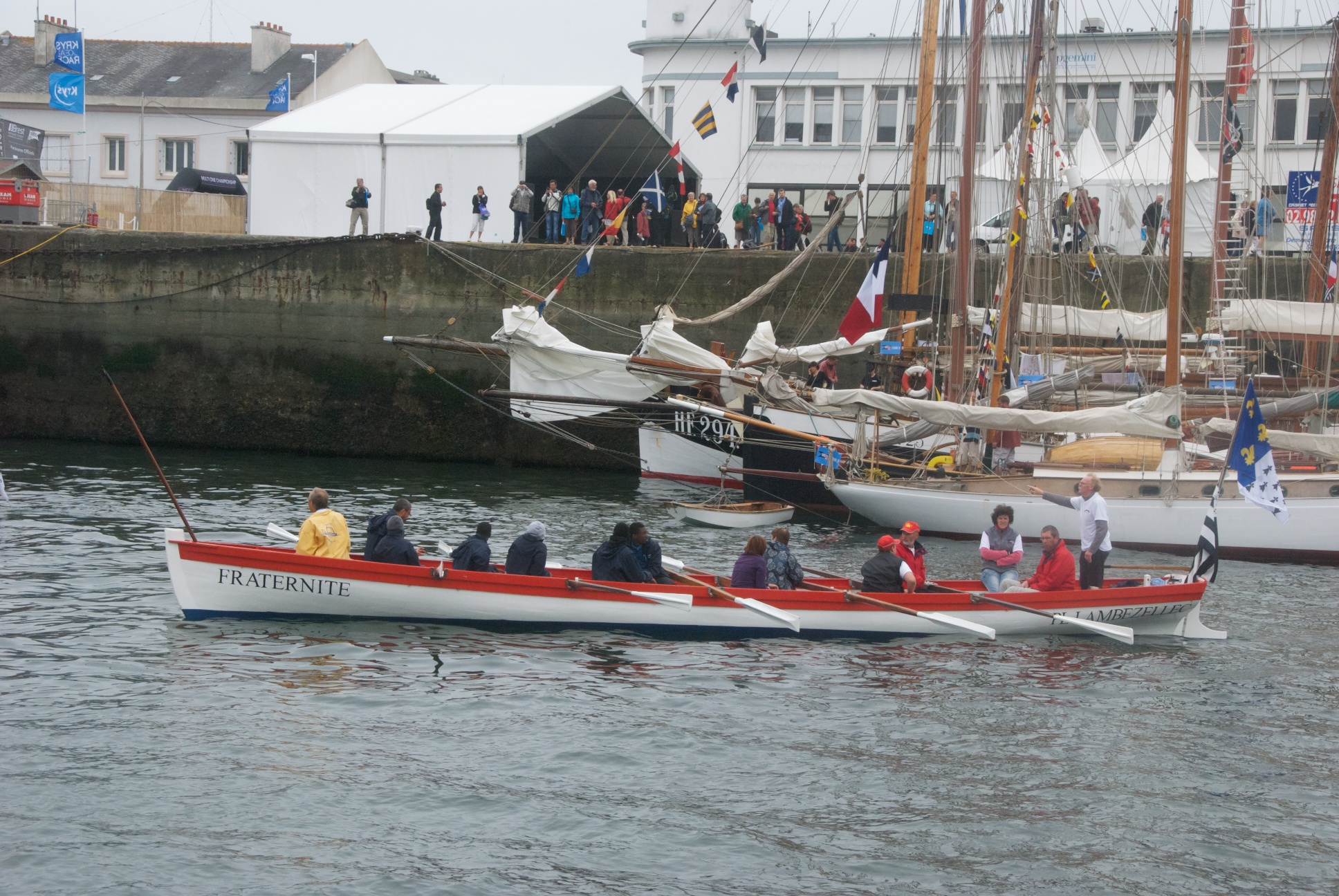 Yole de Bantry Fraternité Yole du PL Lambézellec